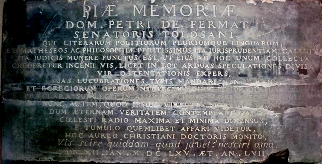 Das Epitaph Pierre de Fermats